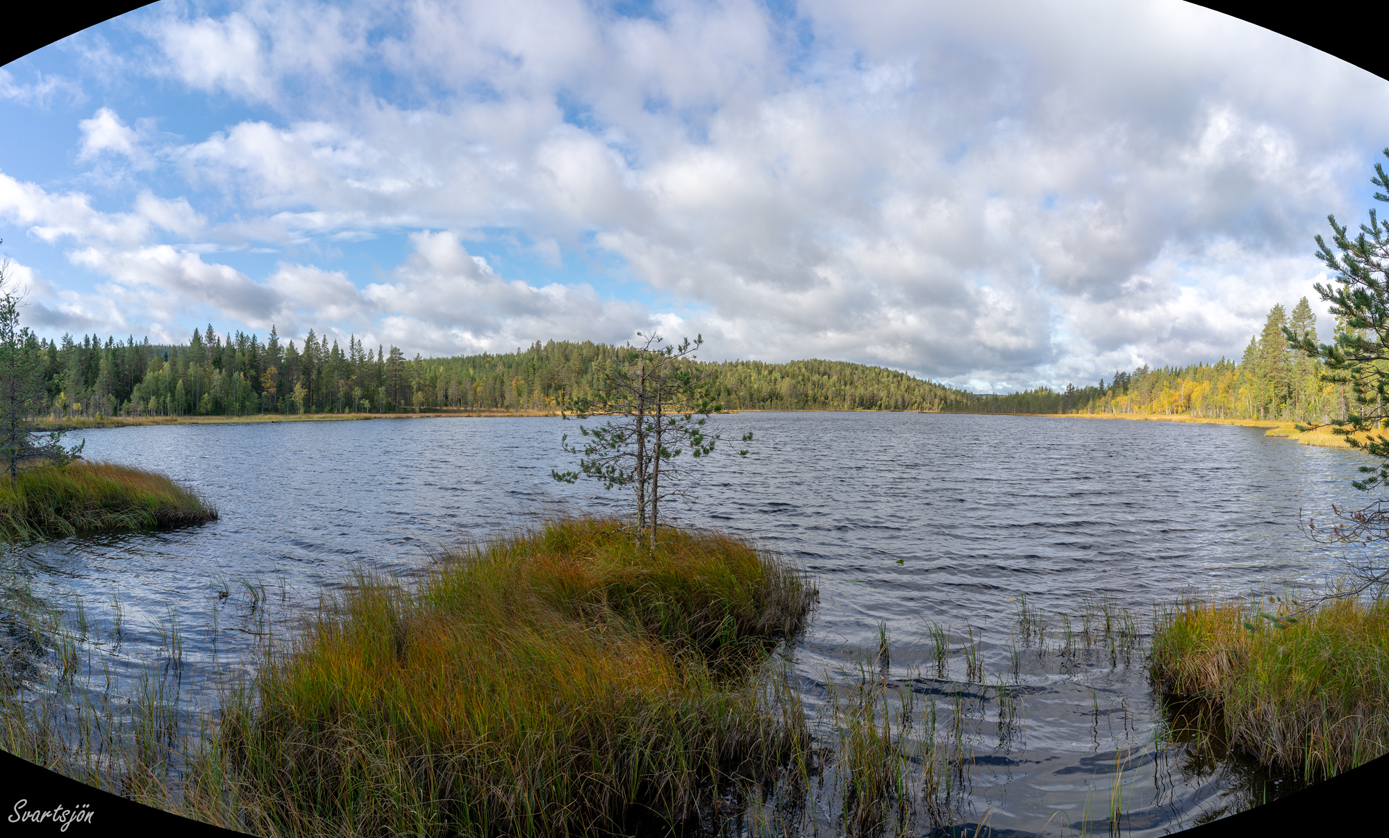 Svartsjön från dess östra sida.